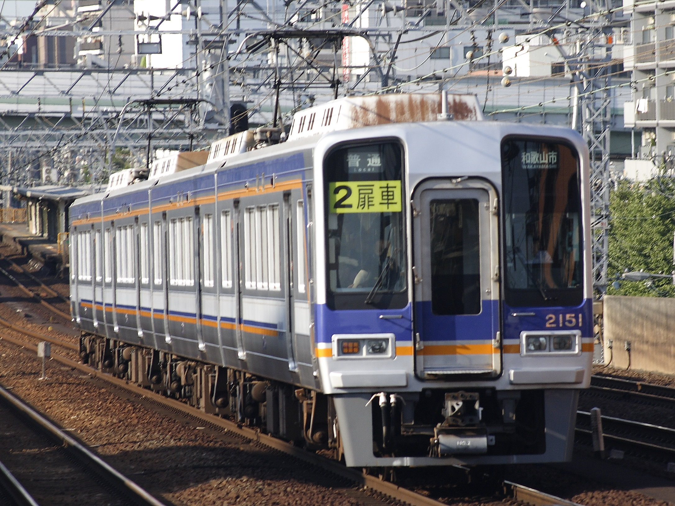 新今宮駅で撮影